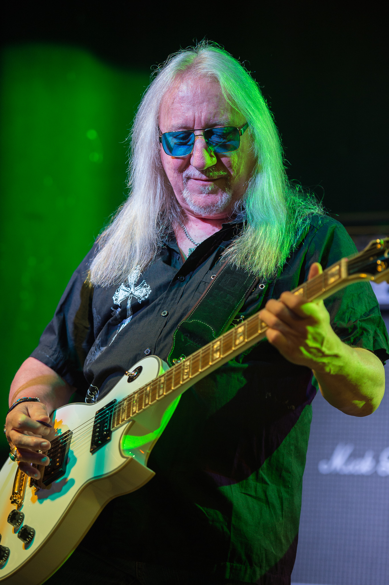 Concertbüro Franken,Der Hirsch,Konzert,Livekonzert,Livemusik,Mick Box,Musik,Uriah Heep